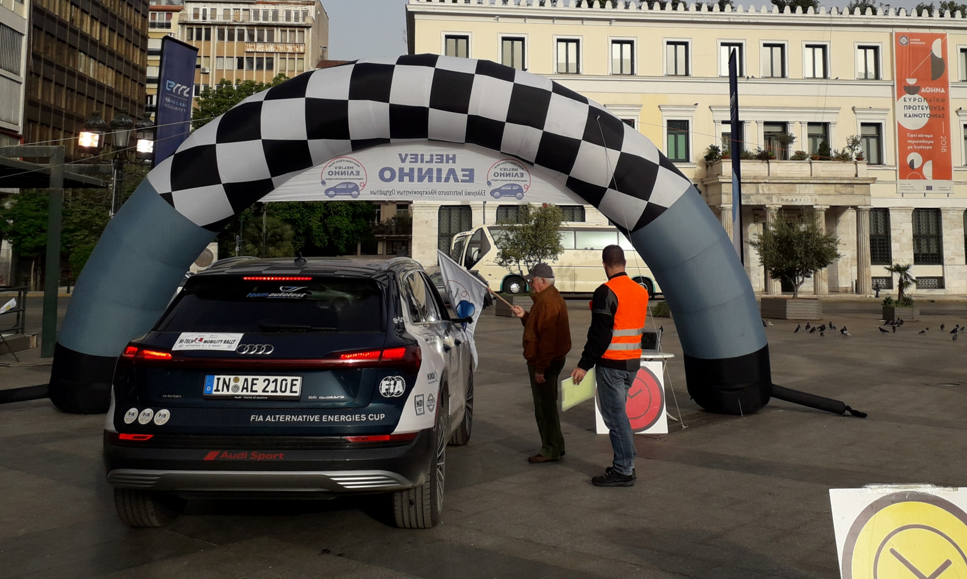 La Audi e-tron di Fuzzy Kofler e Franco Gaioni durante l'Hi-Tech Ecomobility Rally 2019 ad Atene